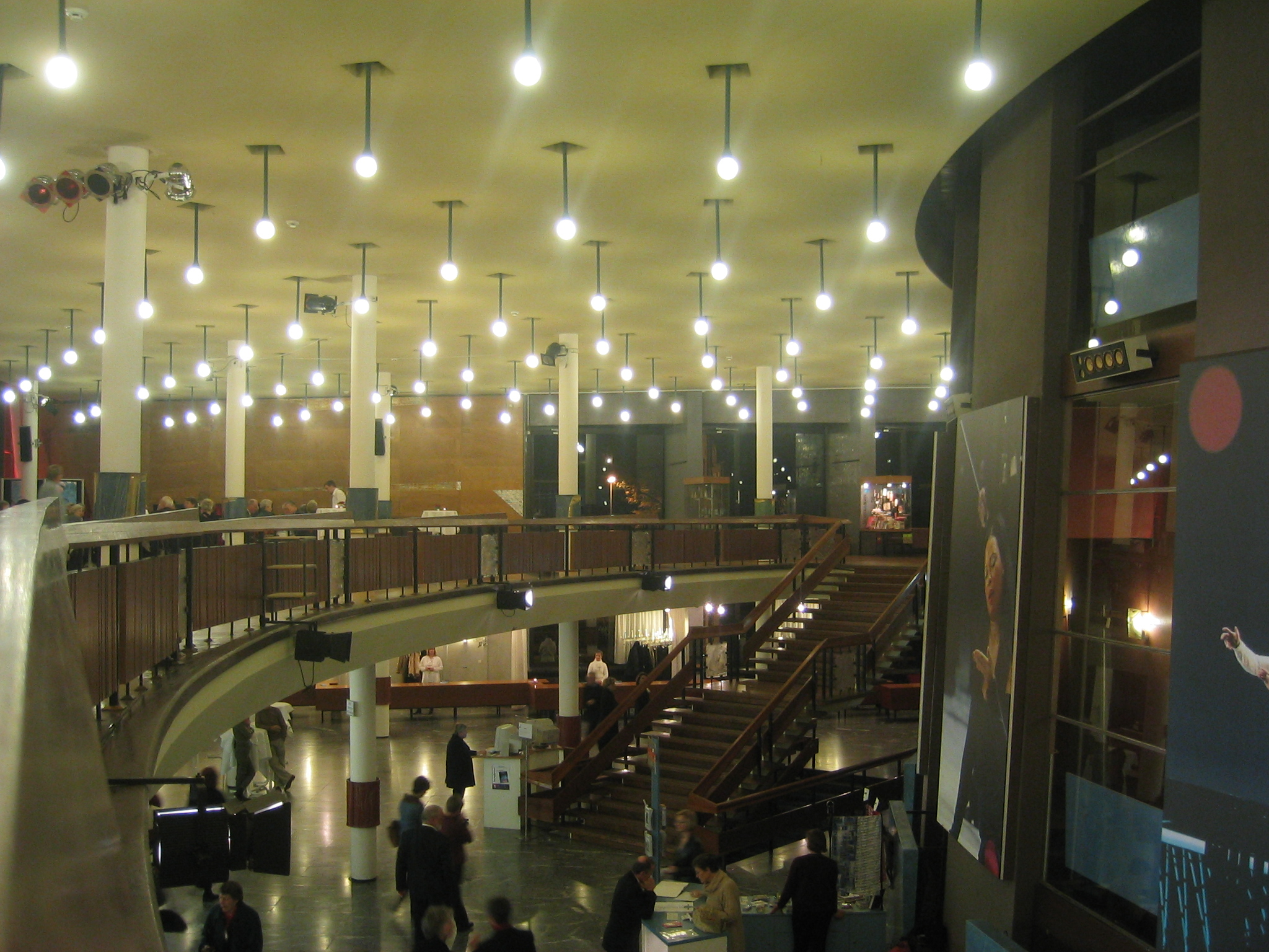 Staatstheater Kassel